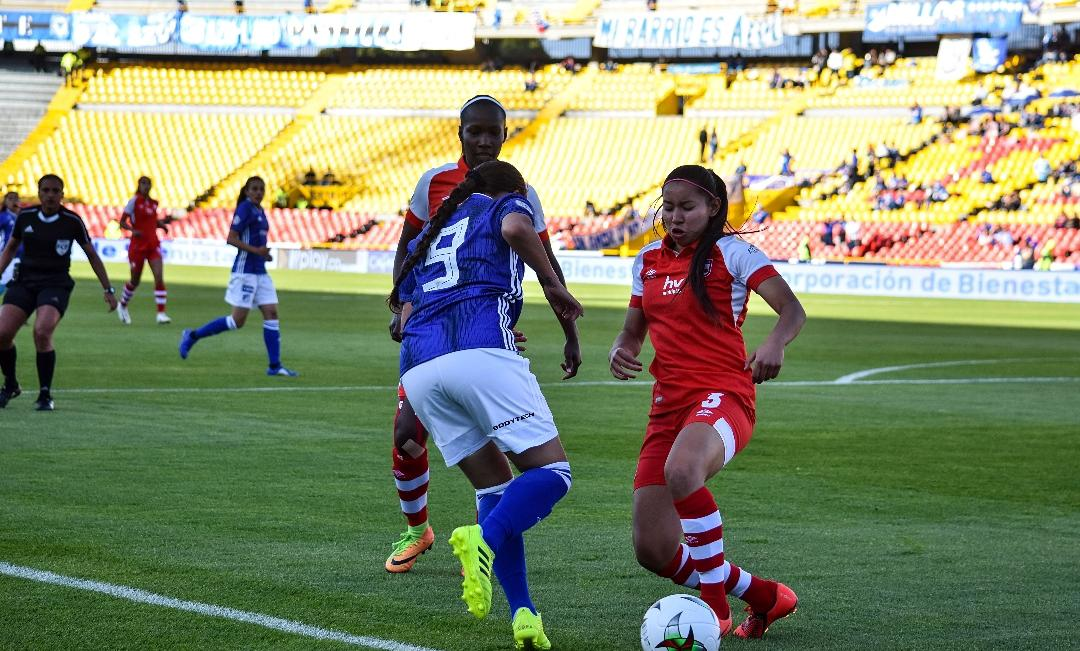 Es una foto de la jugadora de Millonarios Fútbol Club Femenino , Camila García E